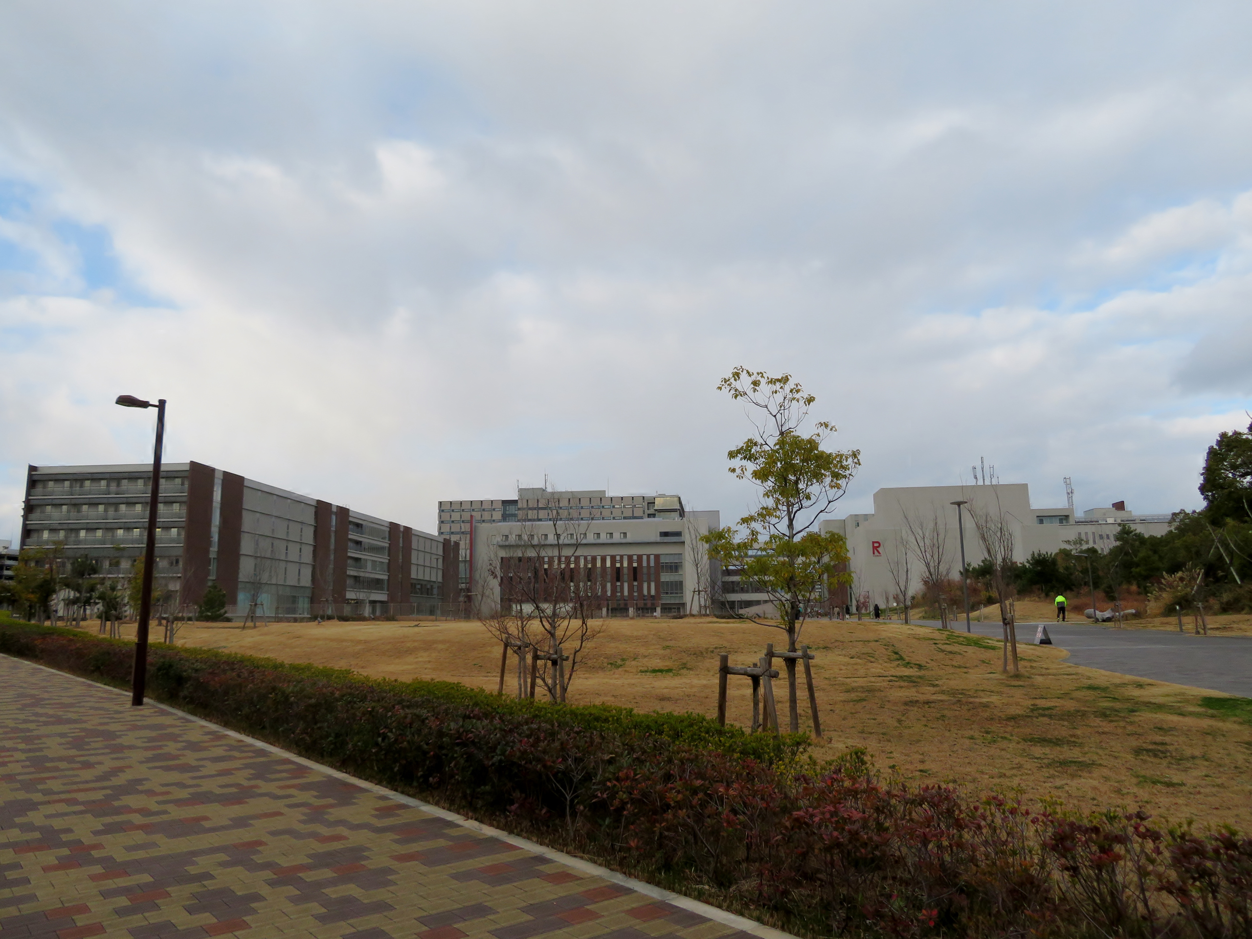 立命館大学大阪いばらきキャンパスを撮影。